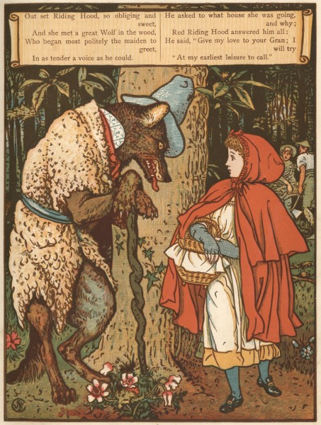 Гравюры по рисункам Крейна к сказкам «Синяя Борода», «Спящая Красавица», «Красная Шапочка», «Джек и бобовый стебель»